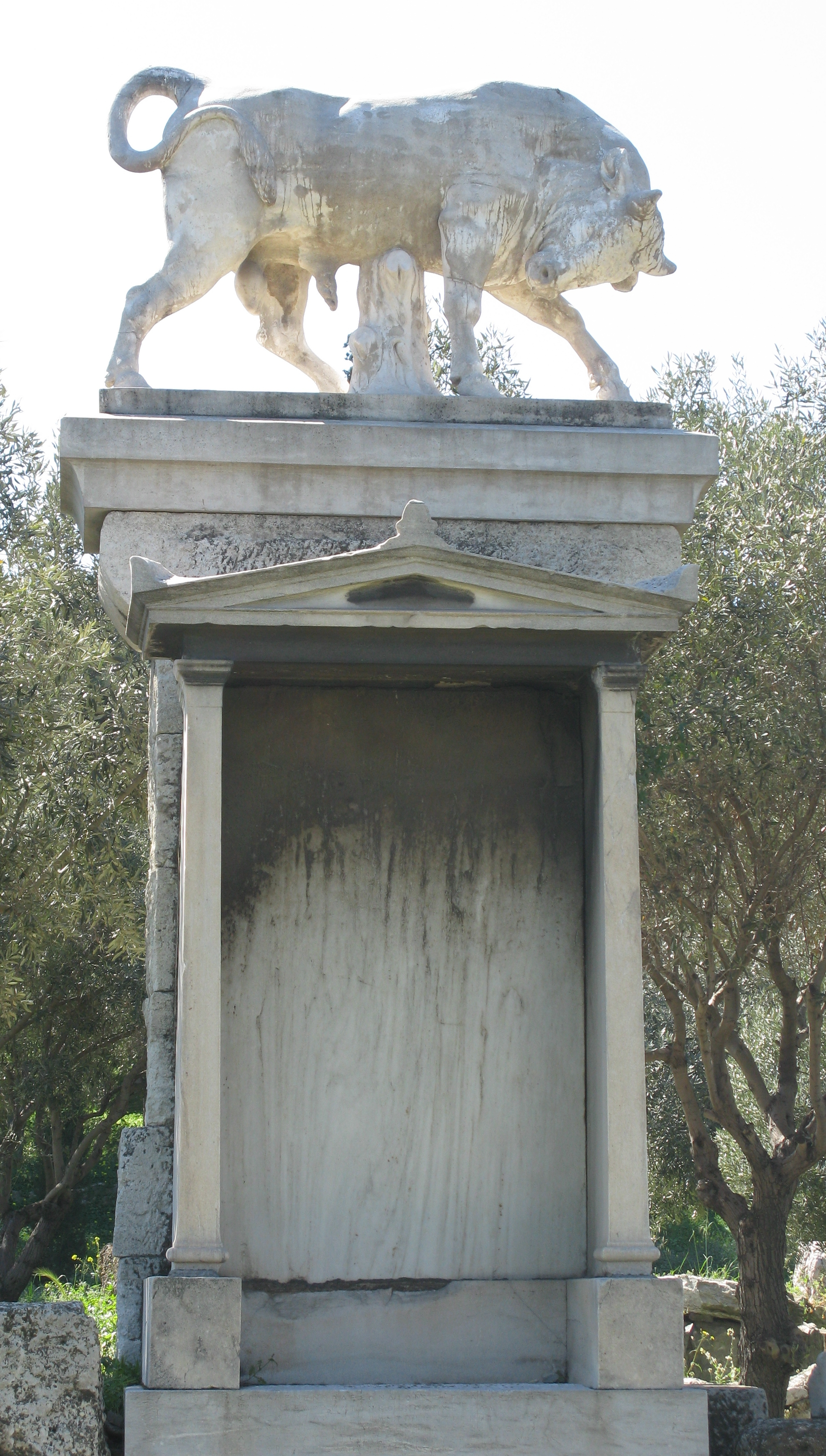 (αντίγραφο) Κεραμεικός, Αρχαίο νεκροταφείο, Αθήνα.